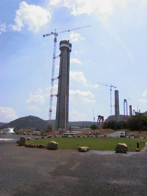 Millau Viaduct: under construction